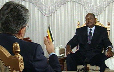 یوری موسوینی